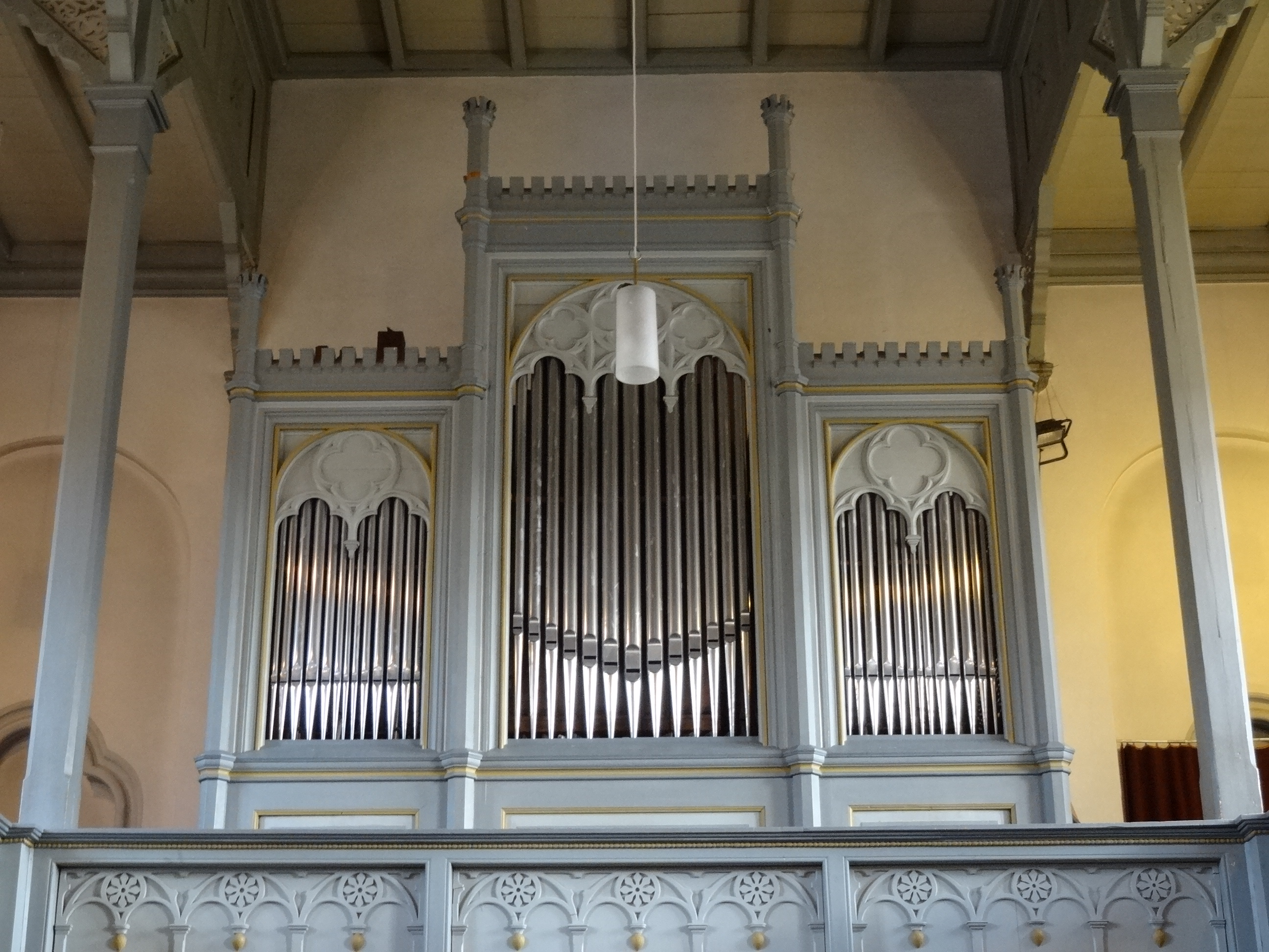 Evangelische Pfarrkirche Langd